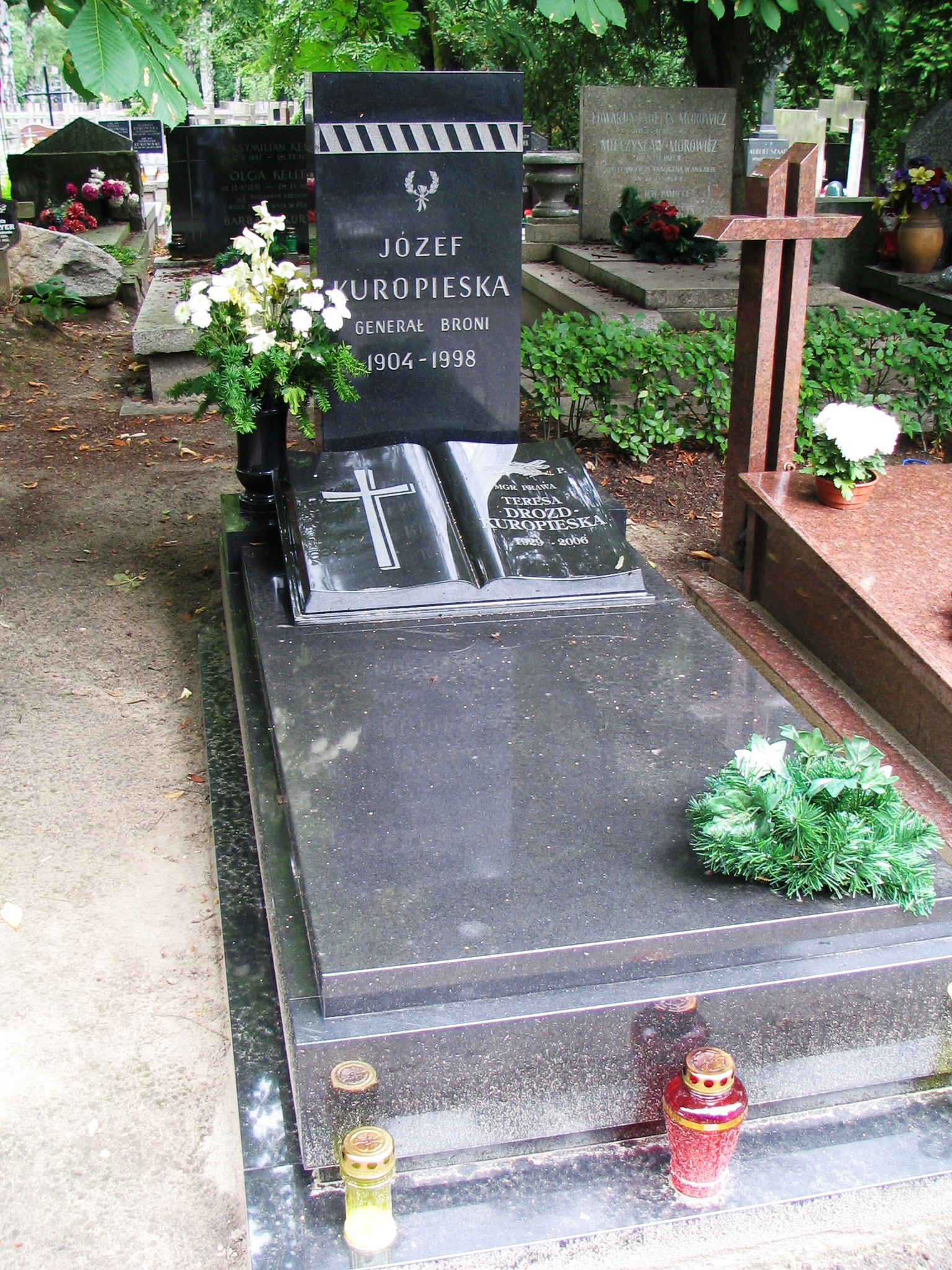 Grób gen. broni Józefa Kuropieski